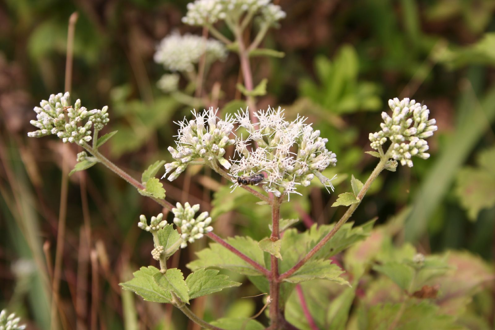 Eupatorium formosanum, Hong Kong